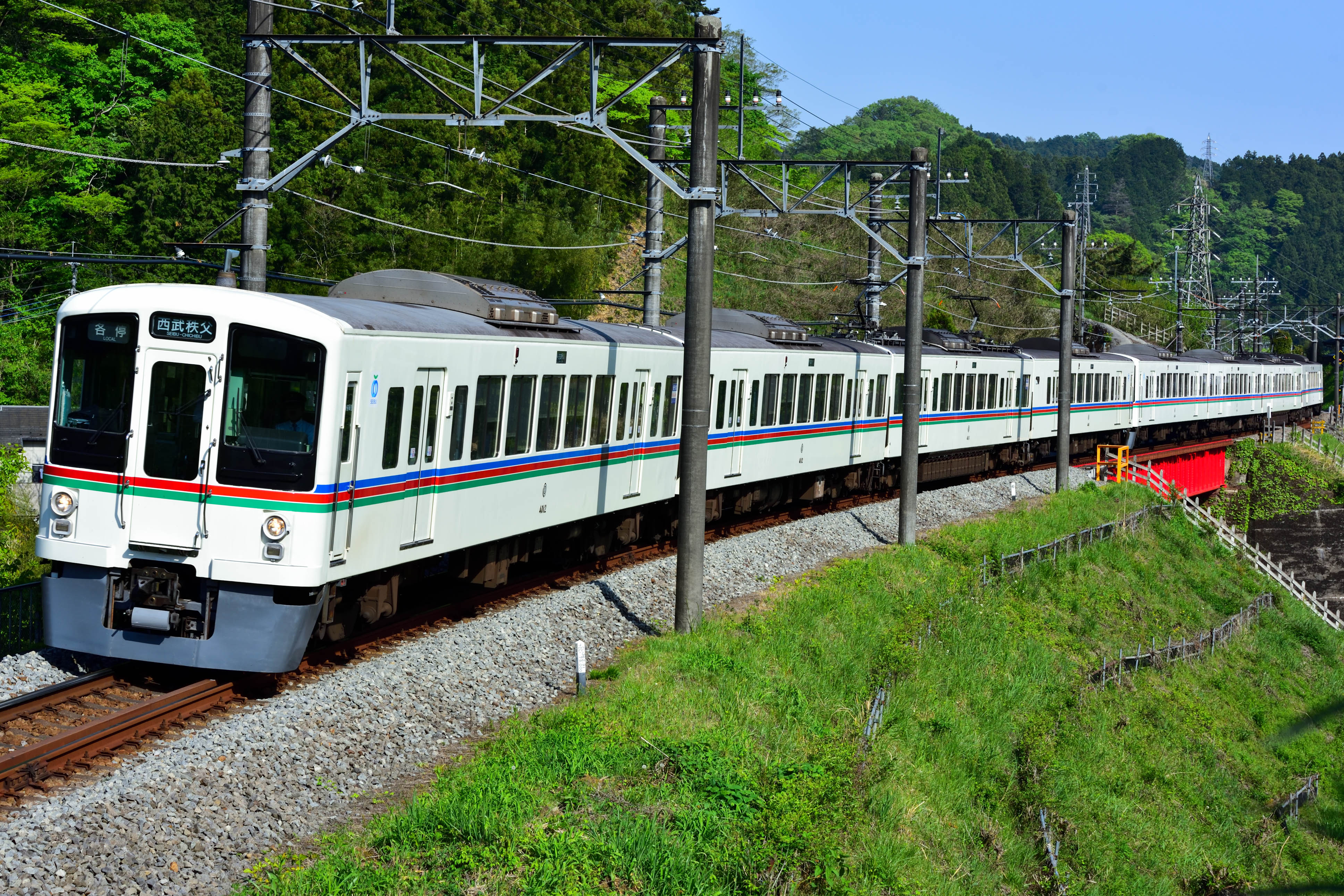 西武池袋線 4000系 8両編成 東吾野～吾野間。 Nikon D750